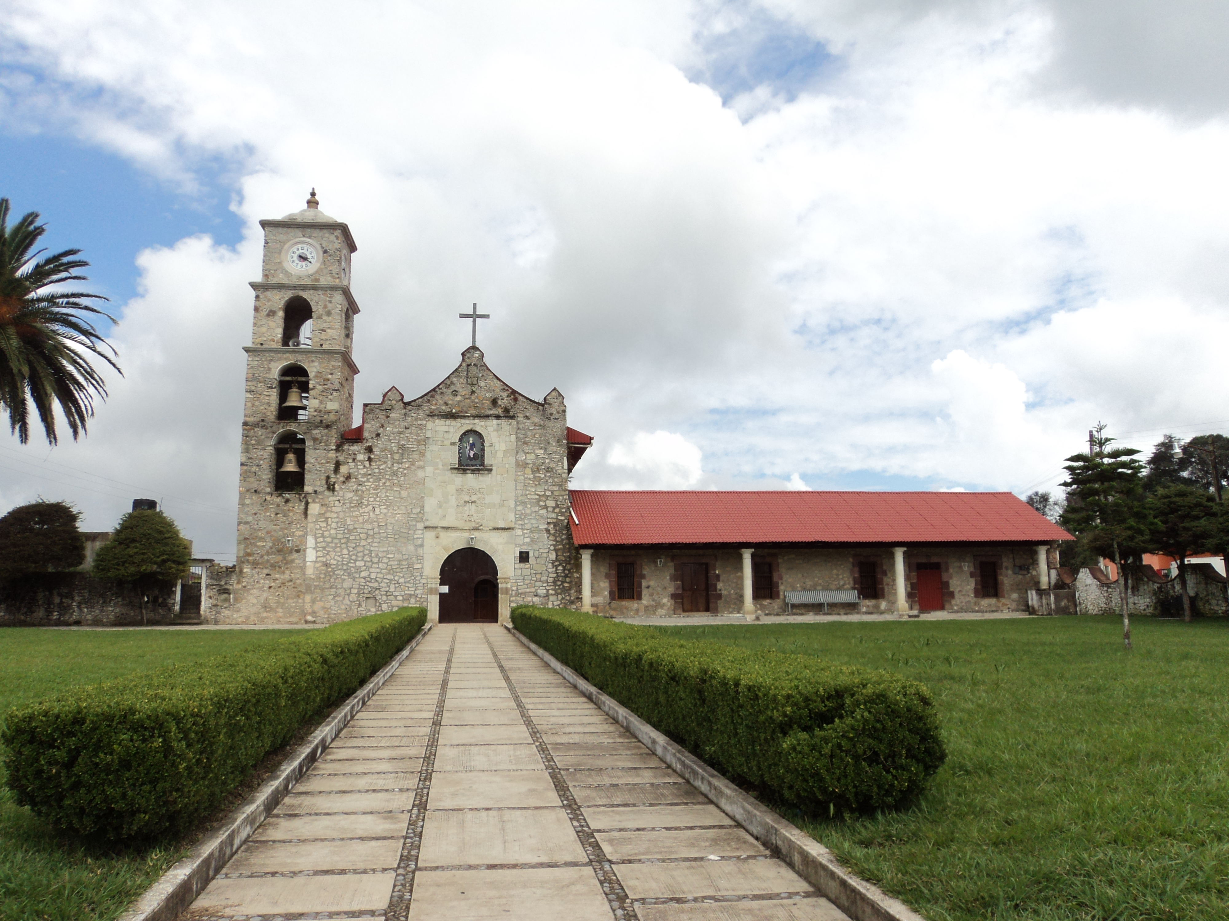 Santa Catarina